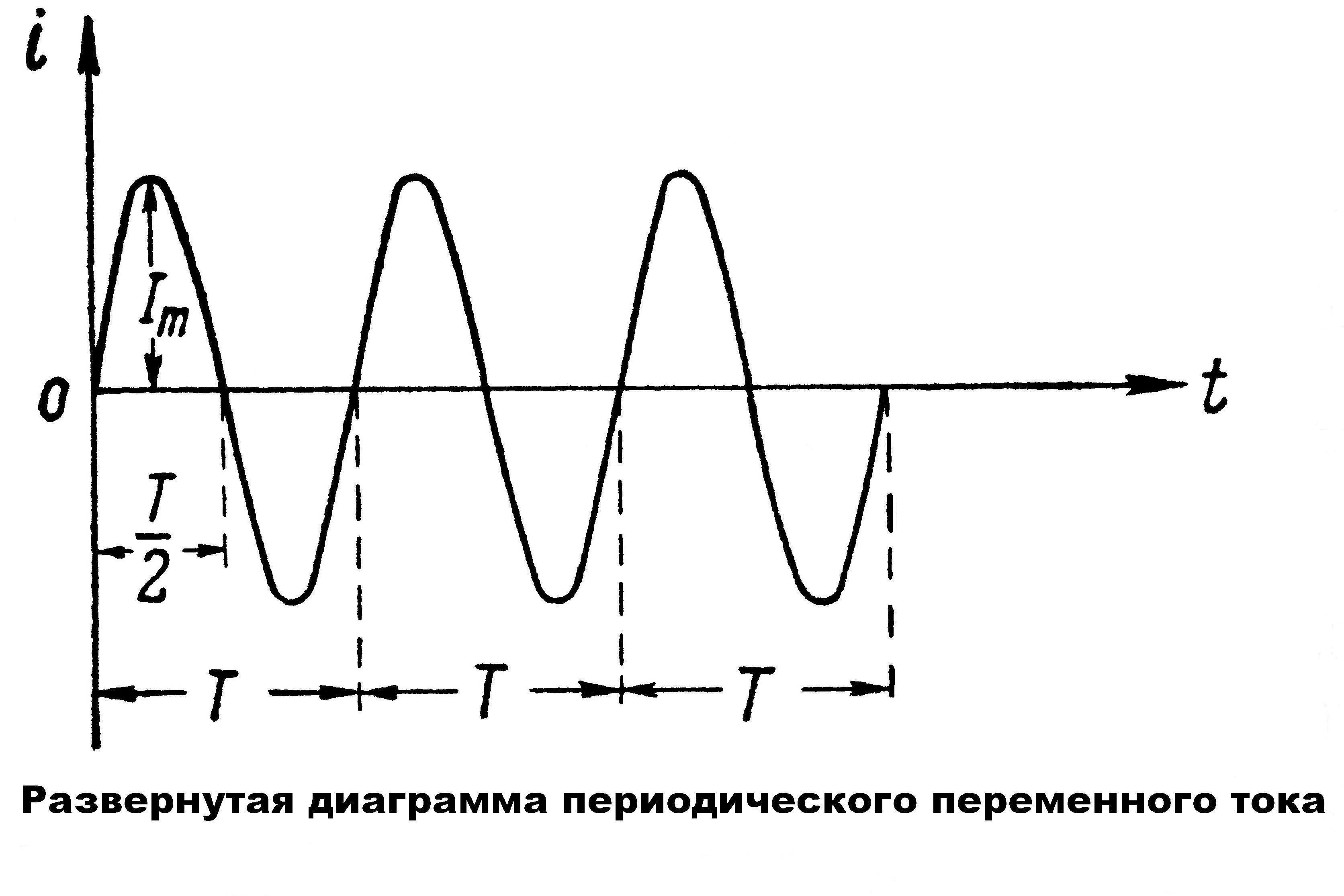 Развернутая диаграмма периодического переменного тока